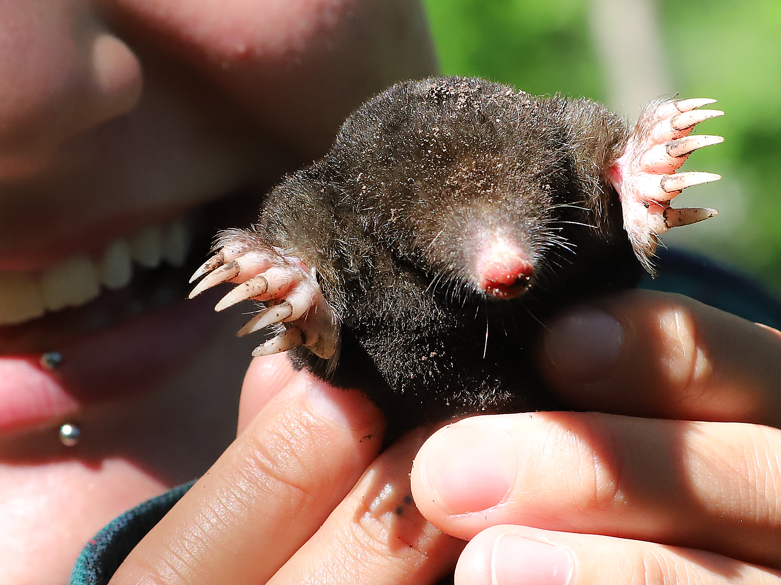 Euroopa mutt (Talpa europaea)